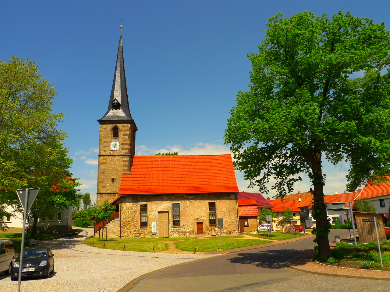 Ernstroda